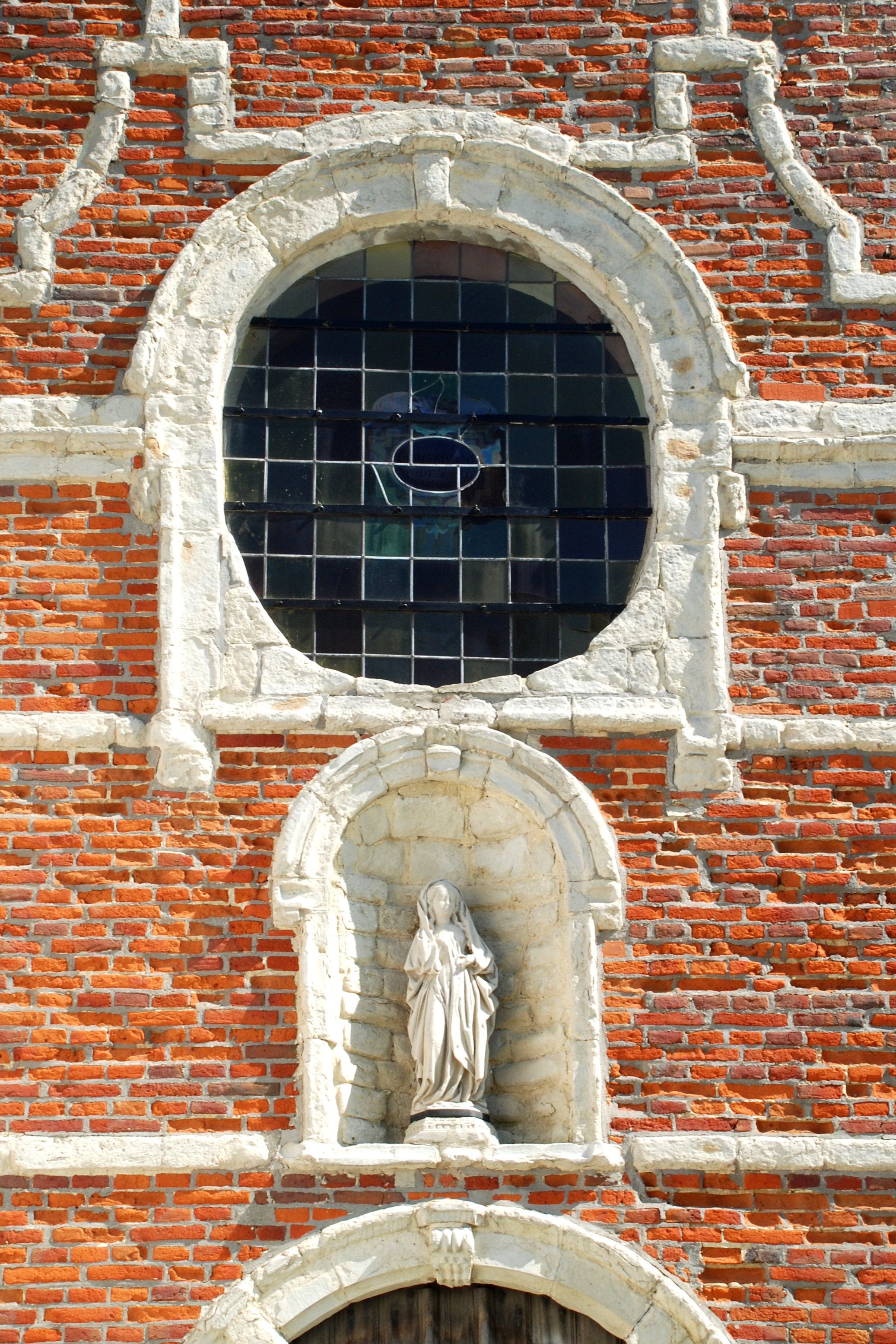 Belgique - Brabant wallon - Genappe - Chapelle du Chantelet